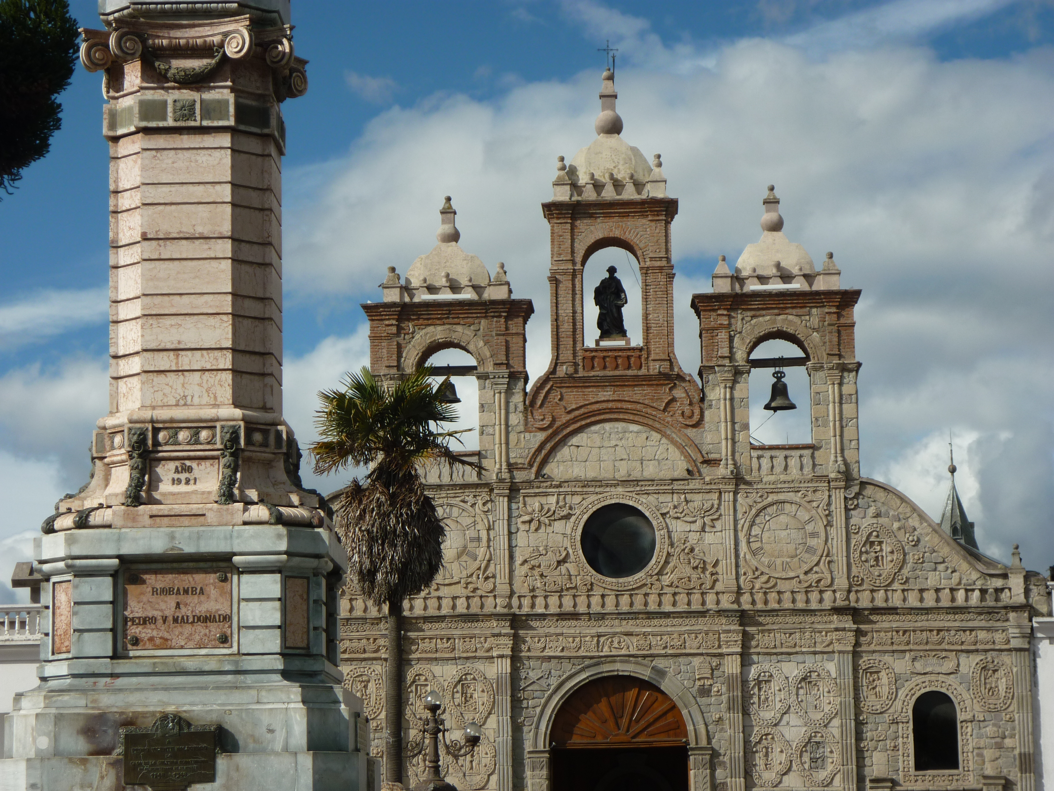 Catedral de Riobamba, Ecuador